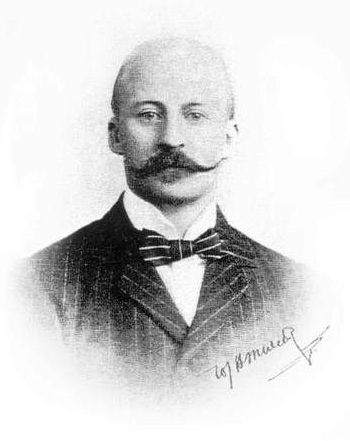 Afbeelding beschikbaar gesteld door het WJH Mulier Instituut, Den Bosch, Nederland.